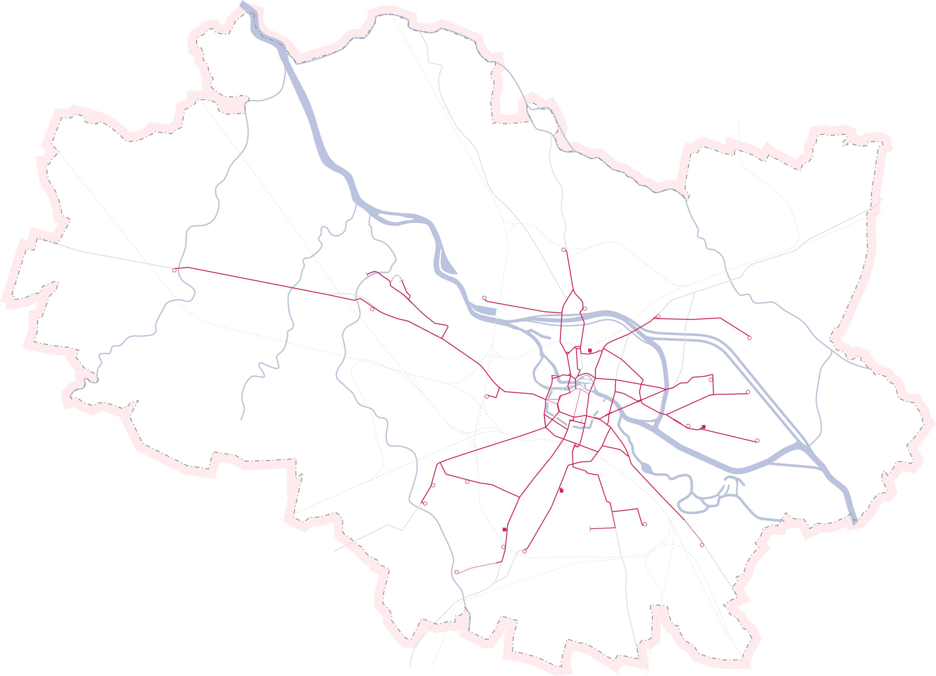 Sieć tramwajowa we Wrocławiu na dzień 28.03.2012 r.